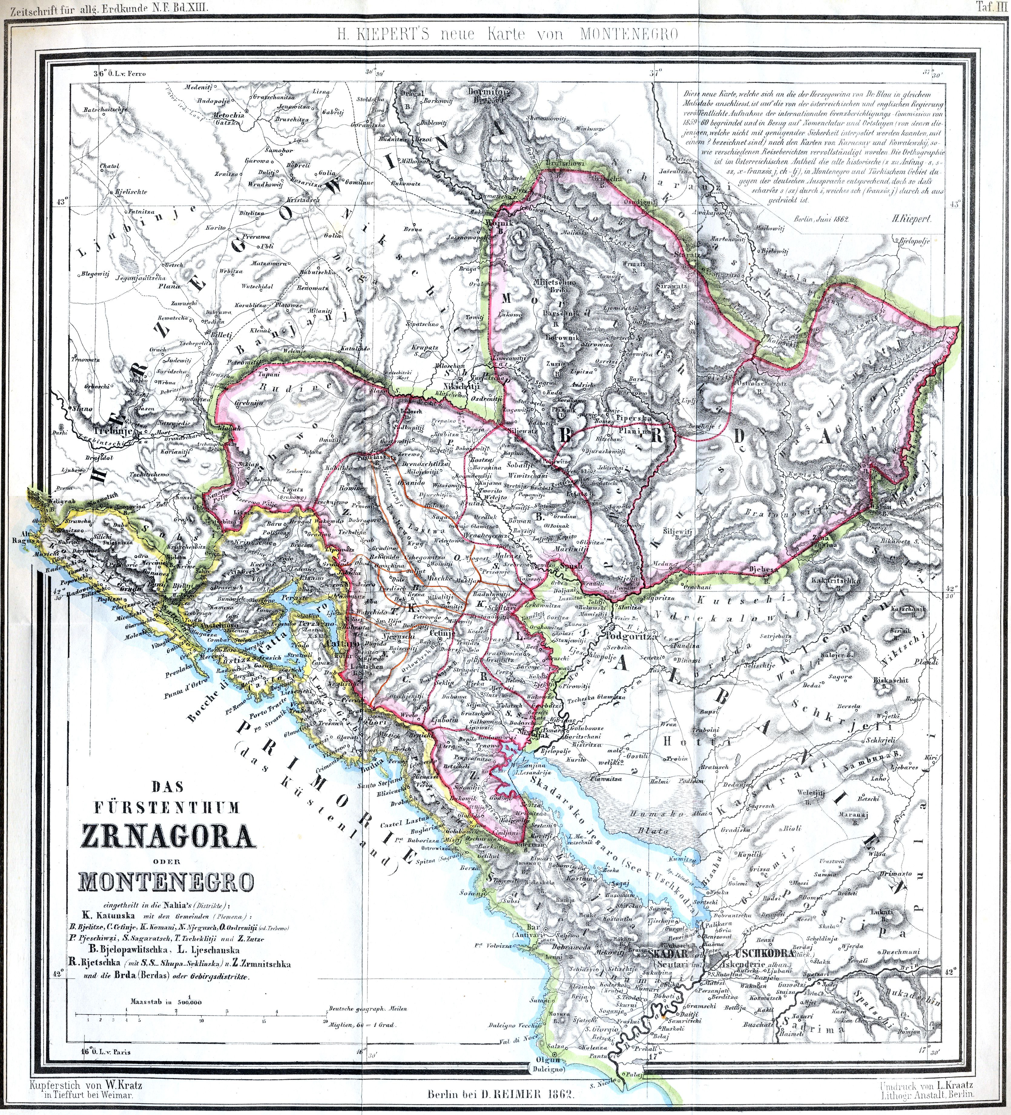 Das Fürstentum Montenegro im Jahre 1862Română: Principatul Muntenegru în anul 1862